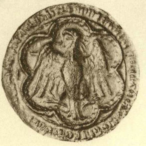 This is a scan of the historical document: Title: Die Siegel der deutschen Kaiser und Könige v. 2 (1347 - 1493)